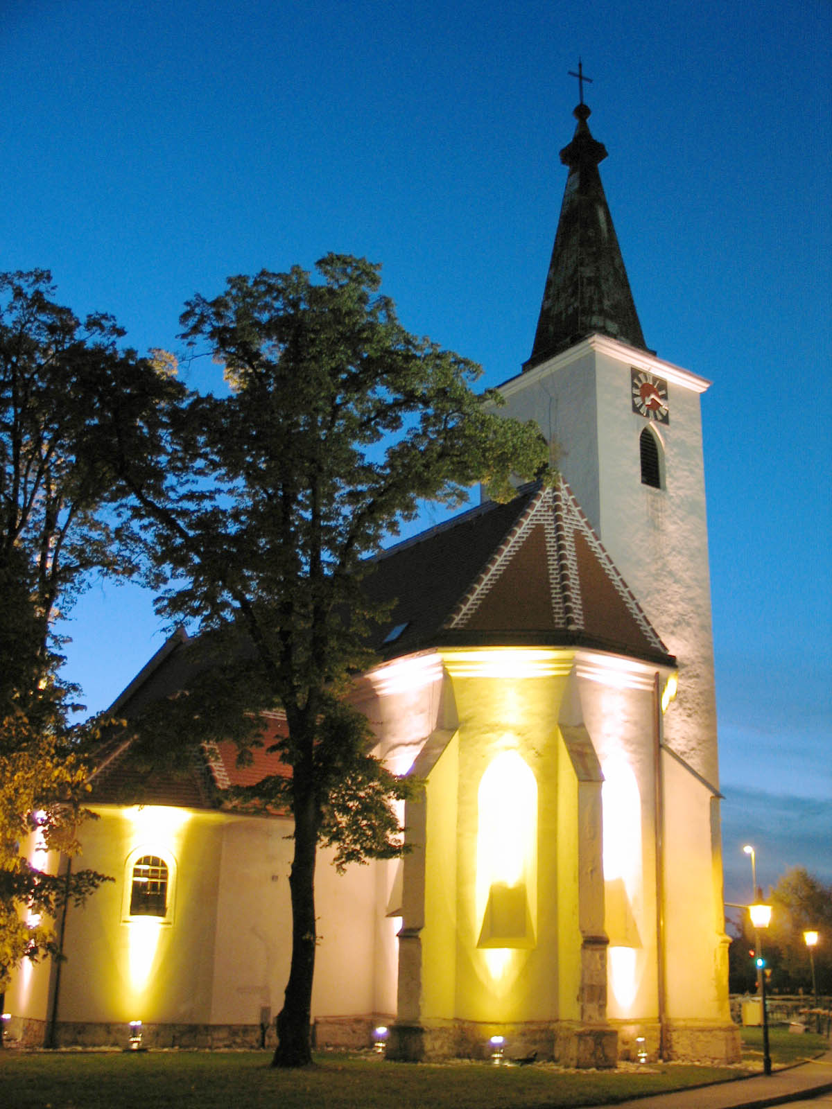 Kath. Pfarrkirche Unbefleckte Empfängnis Mariens bei Nacht in Zeiselmauer (Bez. Tulln)